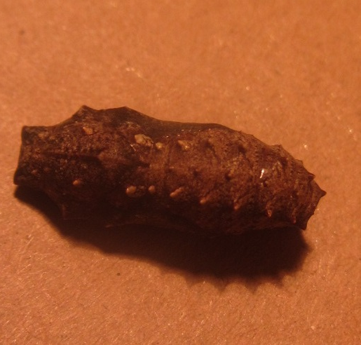 Pupa de Vanessa carye